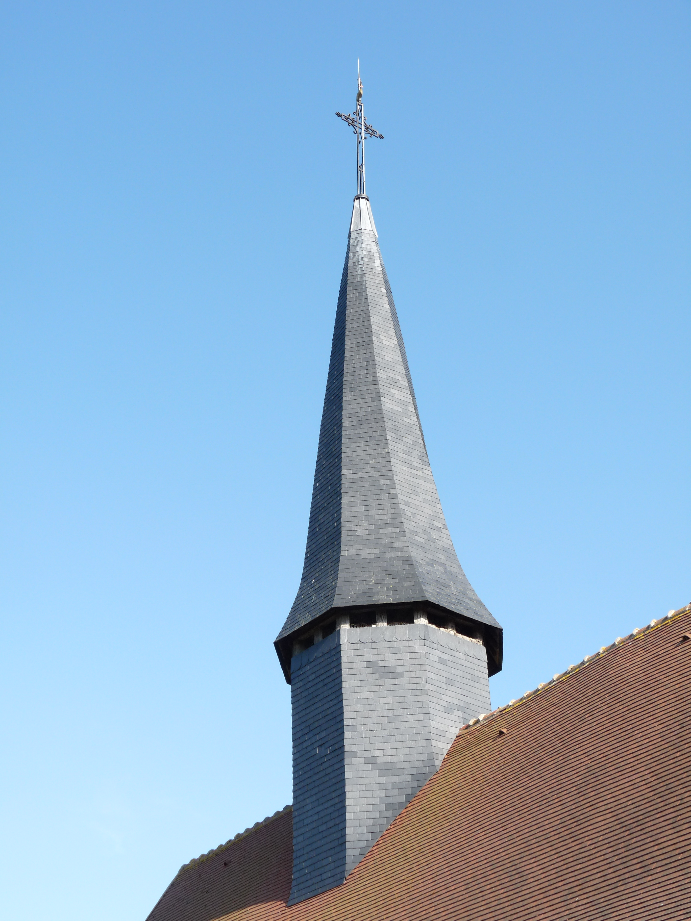 le clocher tors de l'église d'Hectomare (Eure)